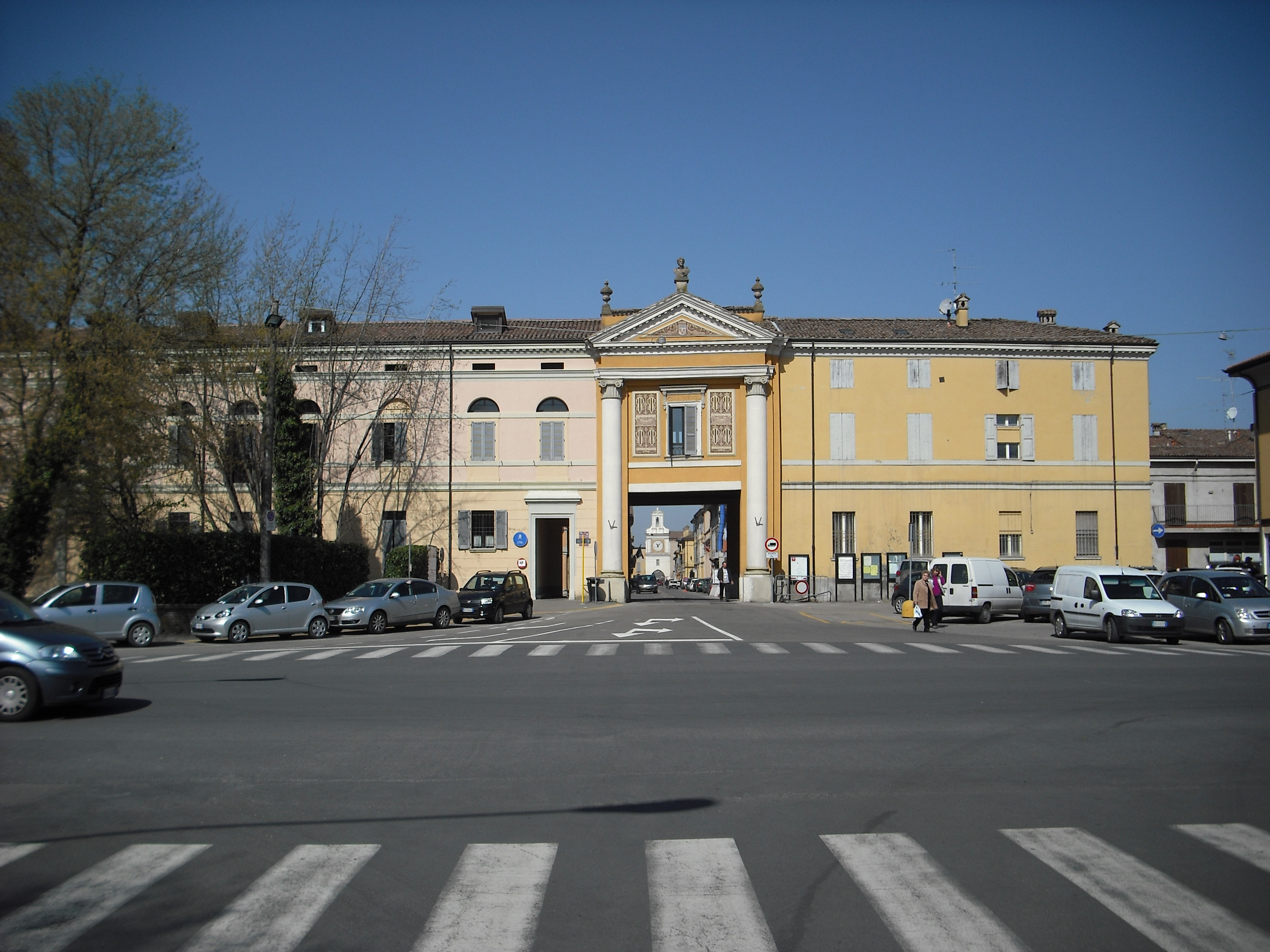 In primo piano c'è Porta Bologna presso Crevalcore e, all'interno del varco, il percorso di via Matteotti che termina su Porta Modena.